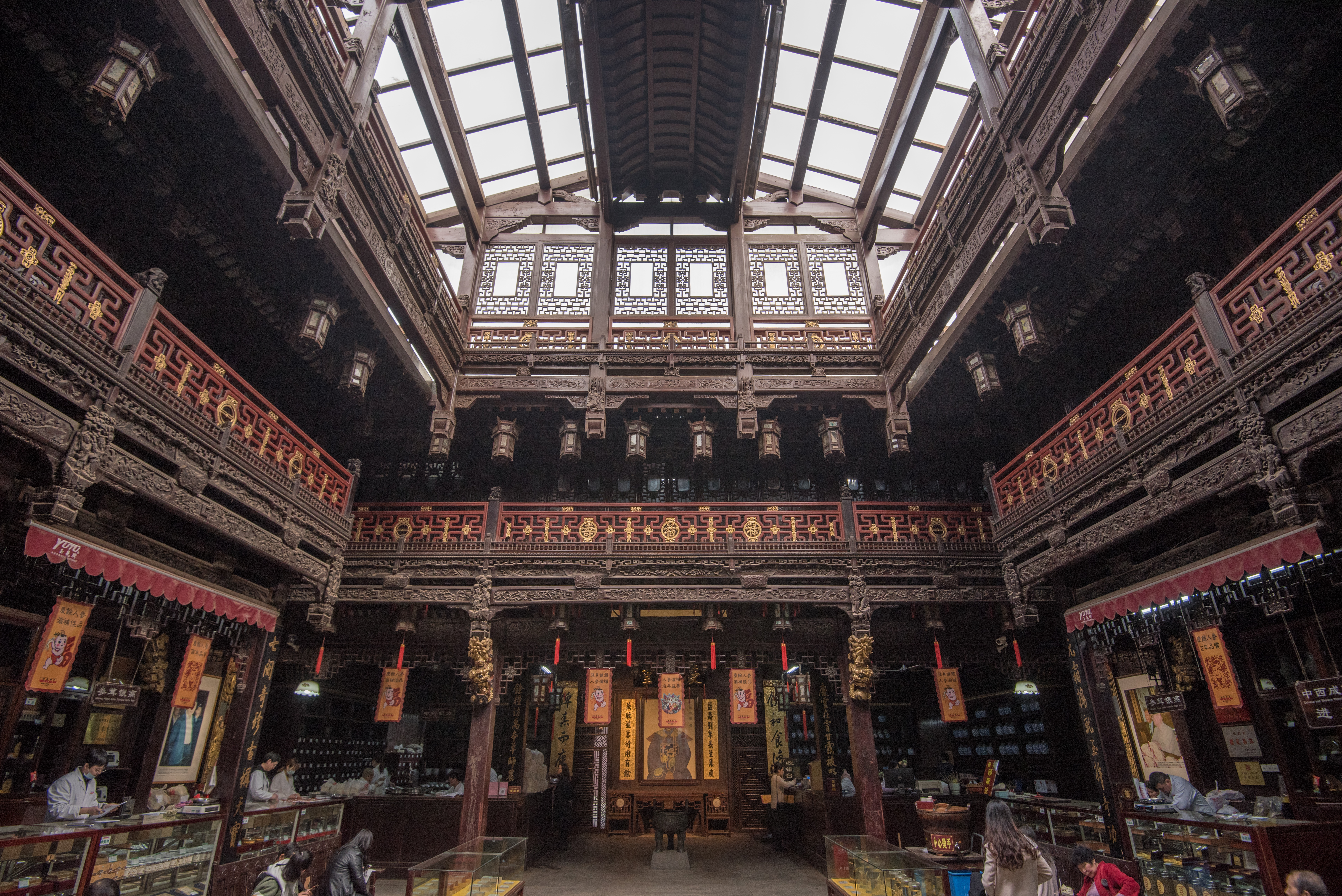 杭州河坊街胡庆余堂